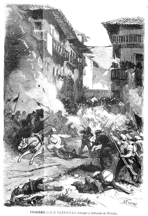 Insurrección carlista, ataque y defensa de Estella, en la revista española La Ilustración Española y Americana.